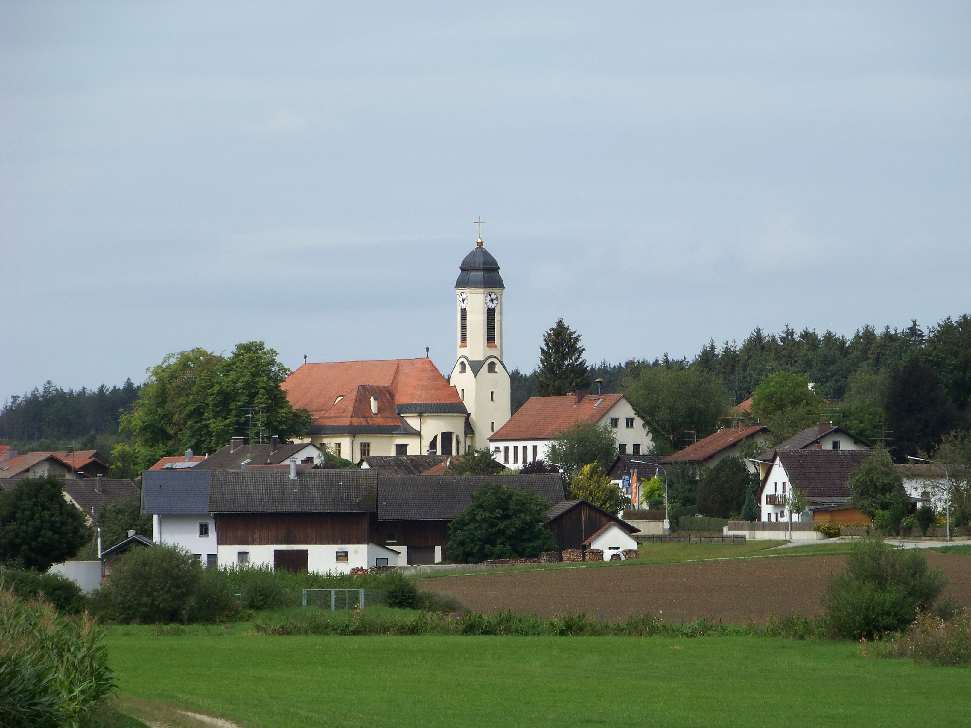 Kröning, Dietelskirchen, Ortsansicht mit Pfarrkirche Maria Immaculata. Saalraum mit querhausartiger Ausweitung, nördlich Chorflankenturm mit Kuppelhaube, Gliederung durch Pfeiler, Lisenen und Wandvorsprünge, Bau und Dekor in Formen des Jugendstils, von Joseph Elsner jun., 1912/13; mit Ausstattung.